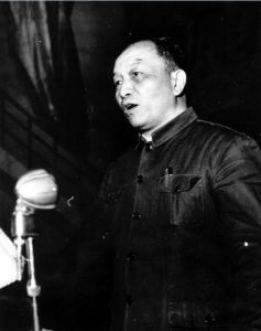 1959年，兰州大学党委书记兼校长江隆基在给全体师生作报告